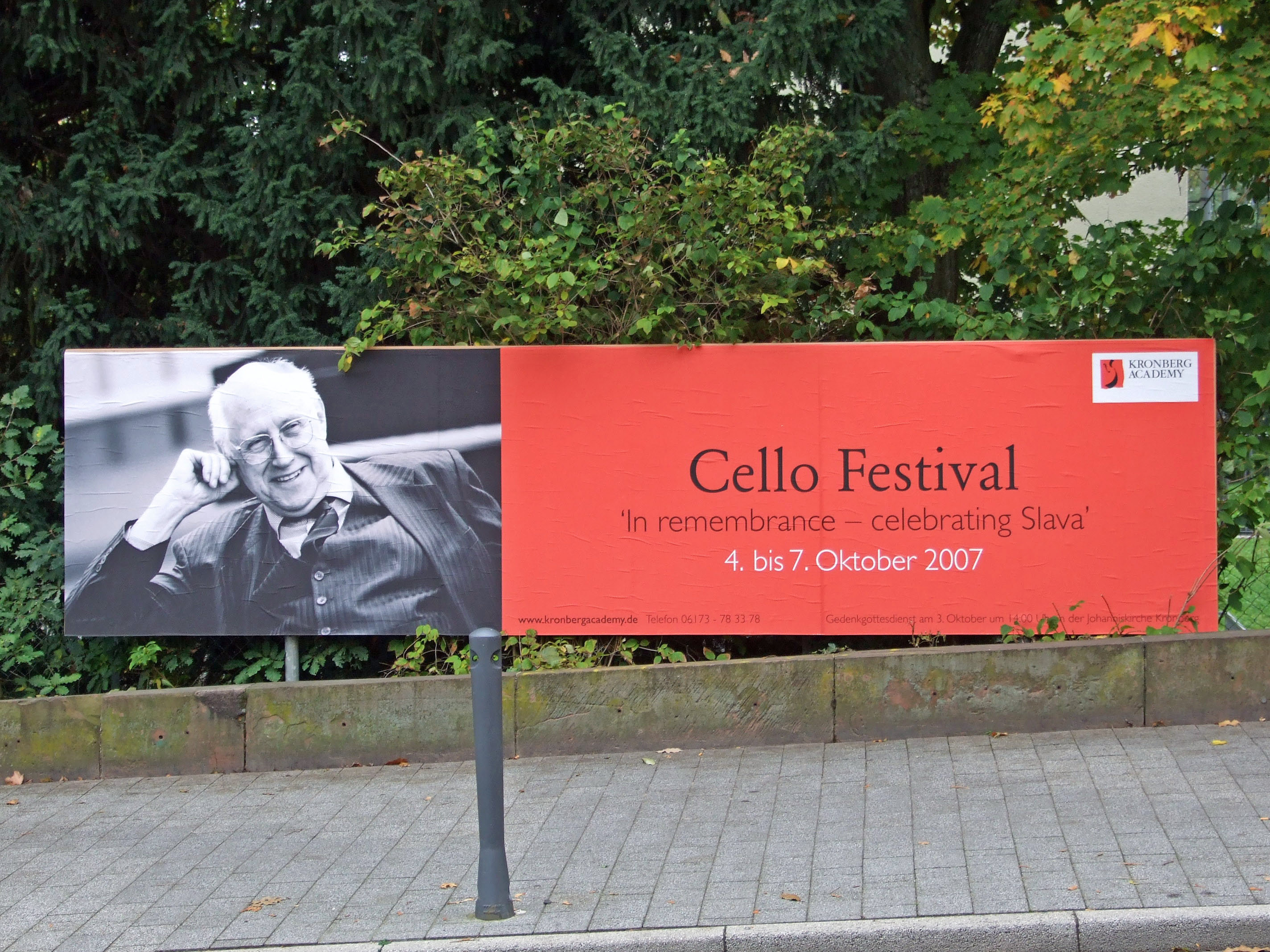 Plakat der Kronberg Akademie zum Festival 2007 mit Foto von Rostropowitsch